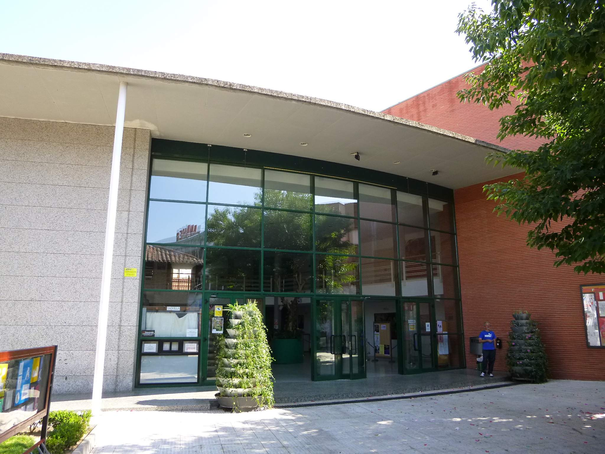 Casa de la Cultura "Teatro Jaime Salom" (Parla)